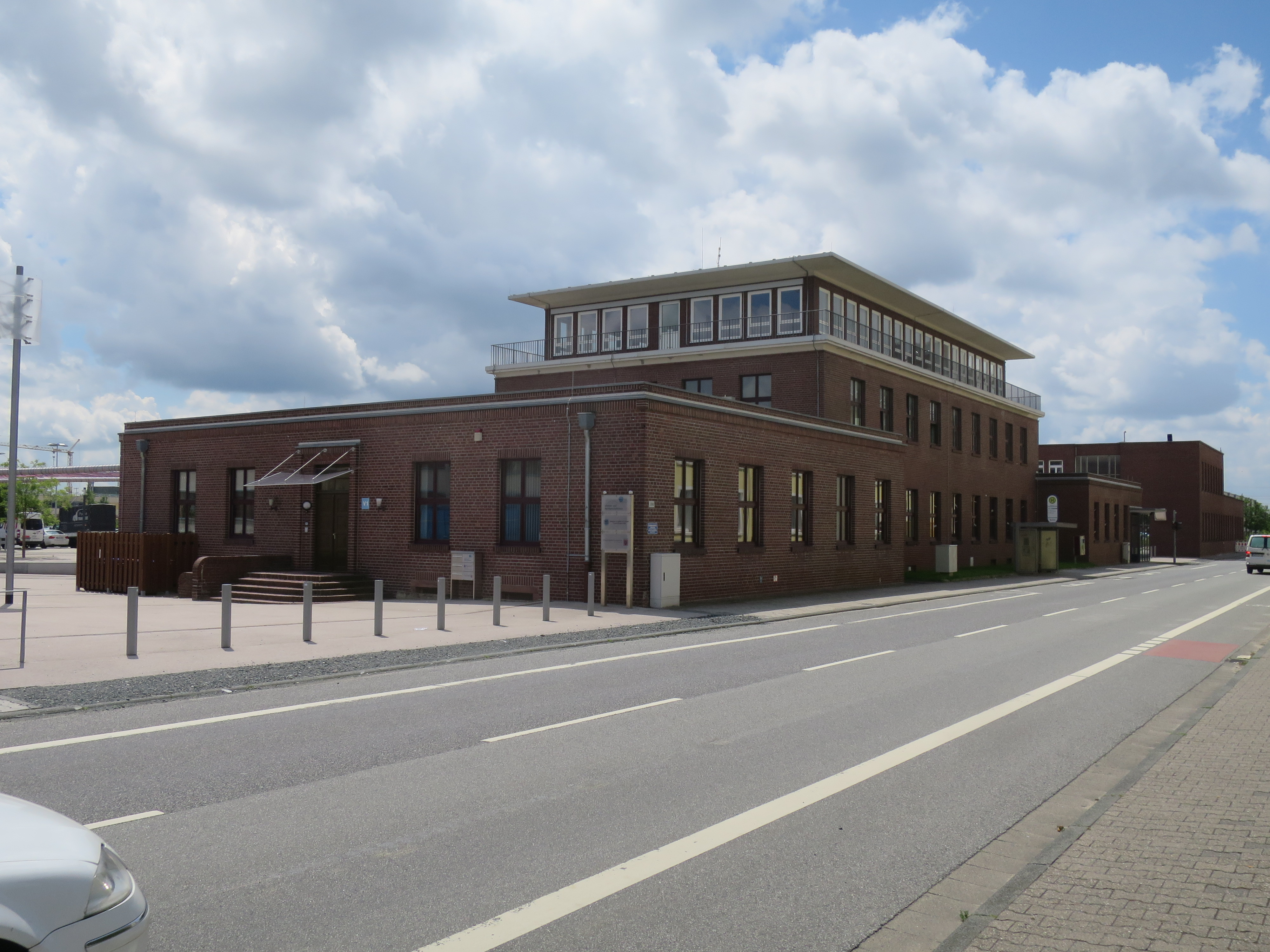 Ehemaliges Verwaltungsgebäude zunächst der Wagonfabrik, dann des Kunstfaserwerks. Heute: Umwelt- und Nachbarschaftshaus Kelsterbach